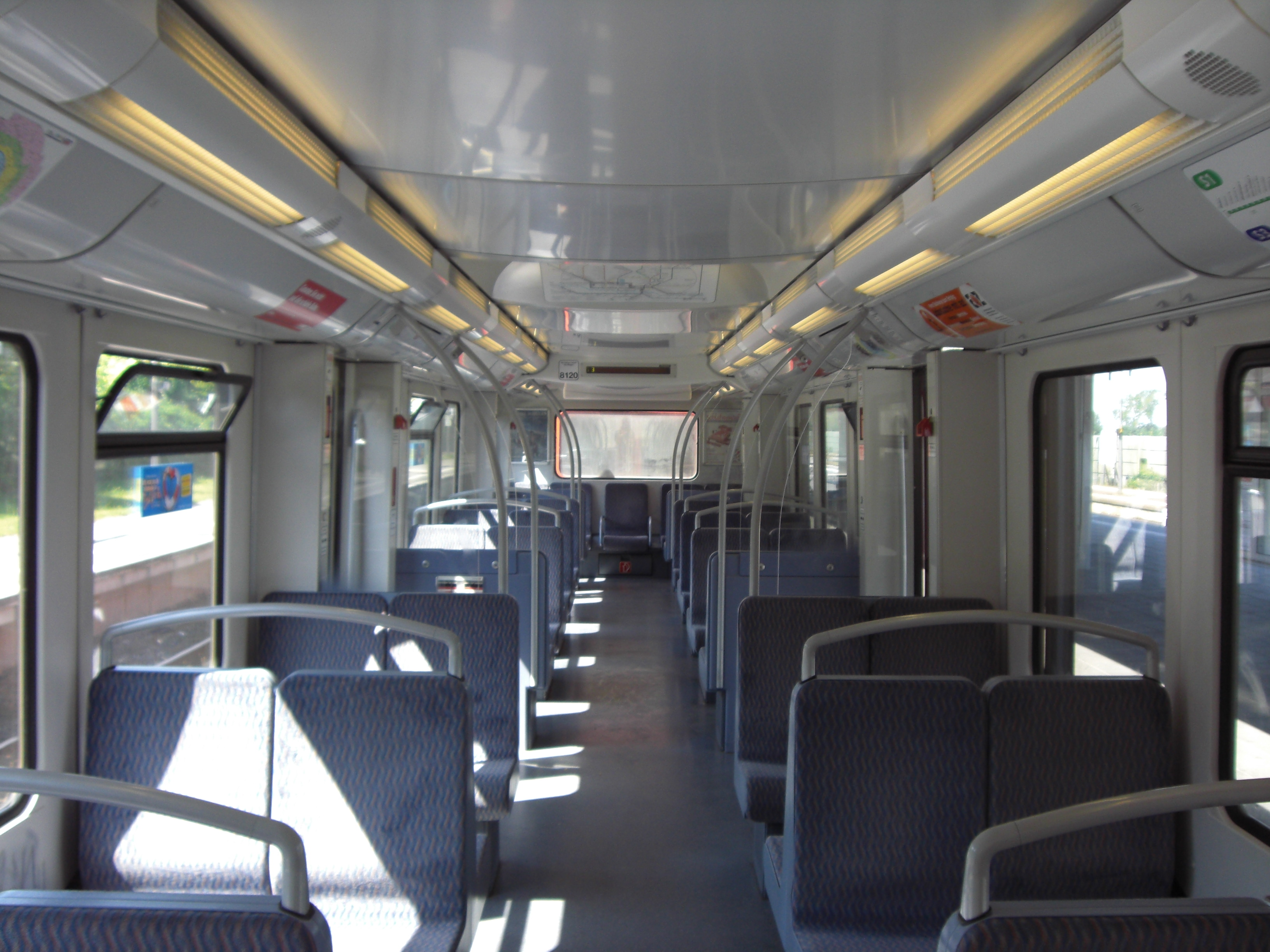 Innenraum des Mittelwagens eins S-Bahn-Zuges der BR 474.